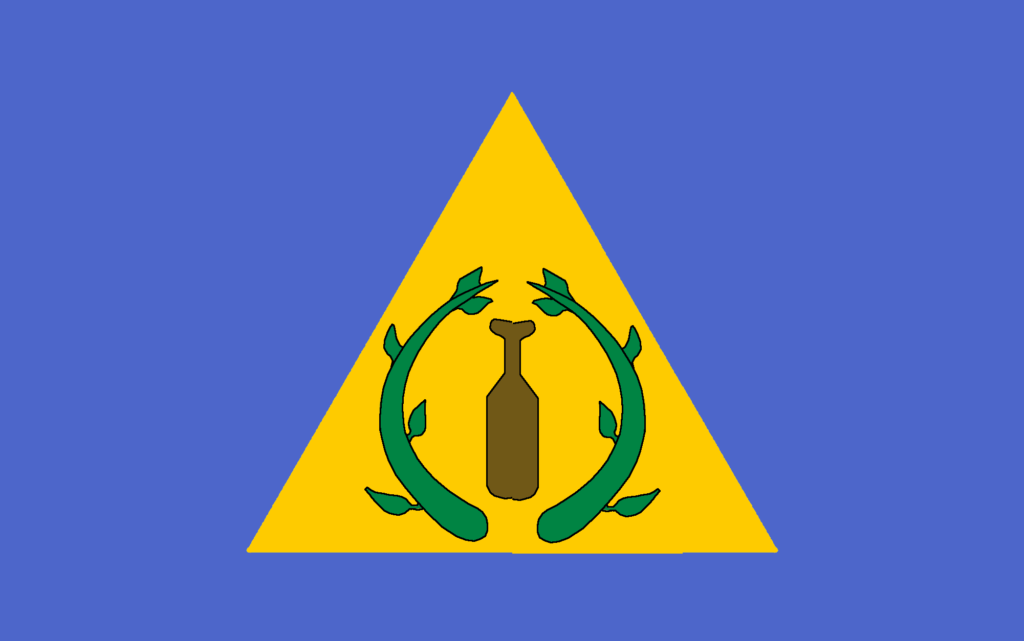 Flag of Kayangel State Palau